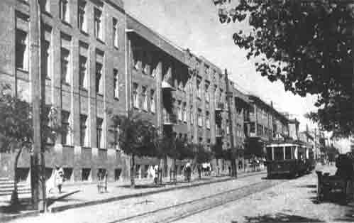 1931. Улица Артёма. Трамвай на рейсе